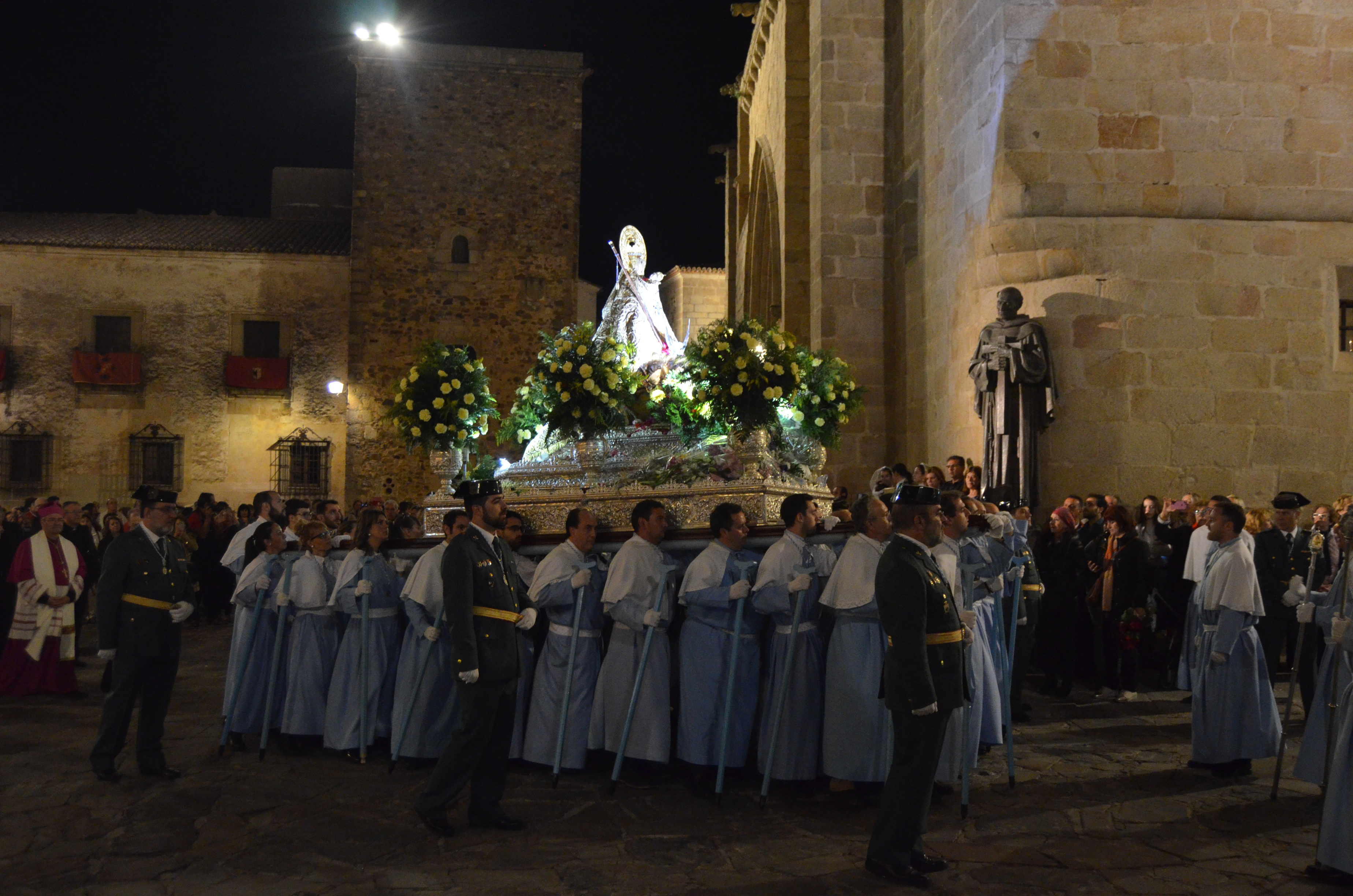 Virgen de la Montaña a punto de entrar en la concatedral de Santa María de Cáceres (España) durante la procesión de bajada de 2017.